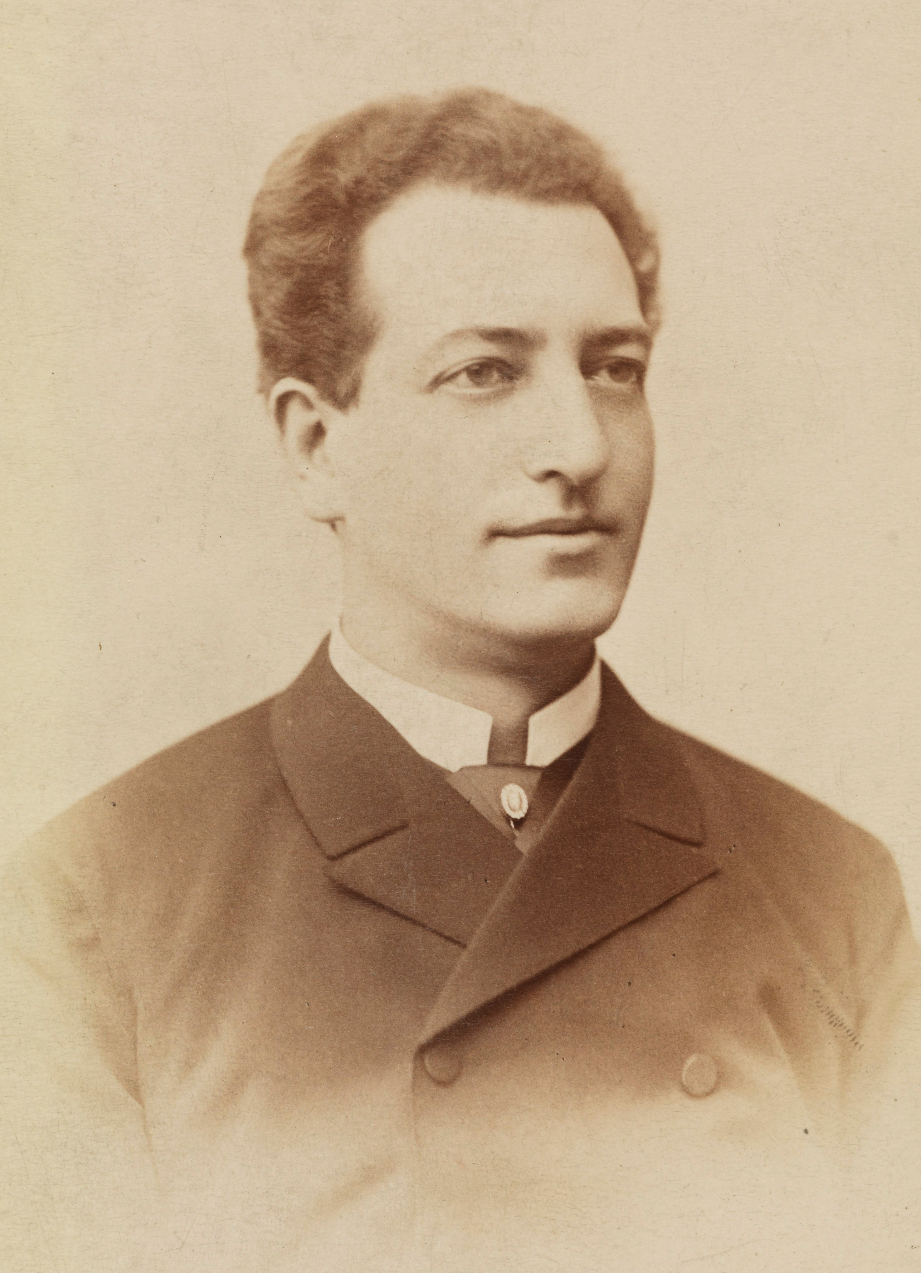 Marian Tatarkiewicz